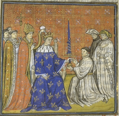 Sacre de Philippe III